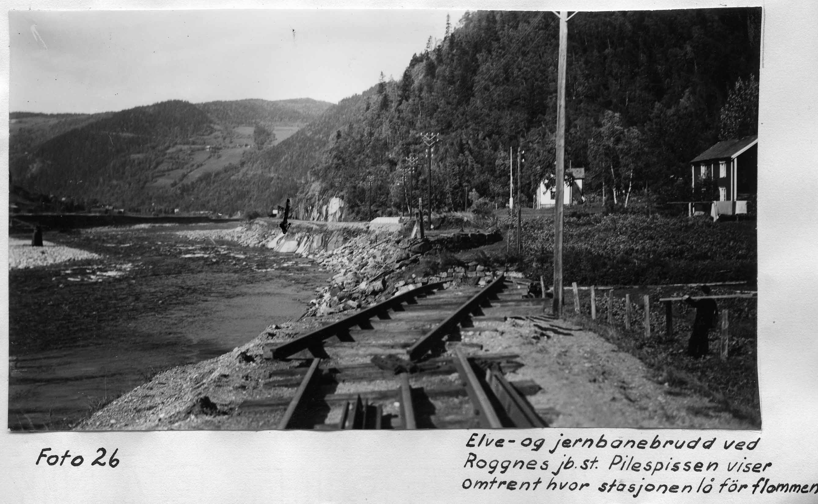 Image Note: Bildenotat: Elve- og jernbanebrudd ved Roggnes jernbanestasjon. Pilspissen viser omtrent hvor stasjonen lå før flommen. Date/Dato: 1940 Photographer/Fotograf: Olaf Strand Feel free to use the photos, but please make sure you attribute the photographer and mention NVE as the source. Bruk gjerne bildene, men vennligst oppgi fotografens navn og angi NVE som kilde. Format: Positive/Positiv Archive/Arkiv: NVE, Hydrologisk avdeling, Ea-30 Image ID/Bilde ID: NVE.H-fb_p-Flom Gaula-1940 nr.026.jpg